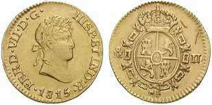 Moneda de 2 escudos acuñada en México en 1815 bajo Fernando VII, AU